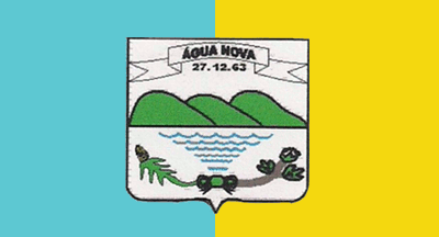 Bandeira de Água Nova, estado do Rio Grande do Norte, Brasil